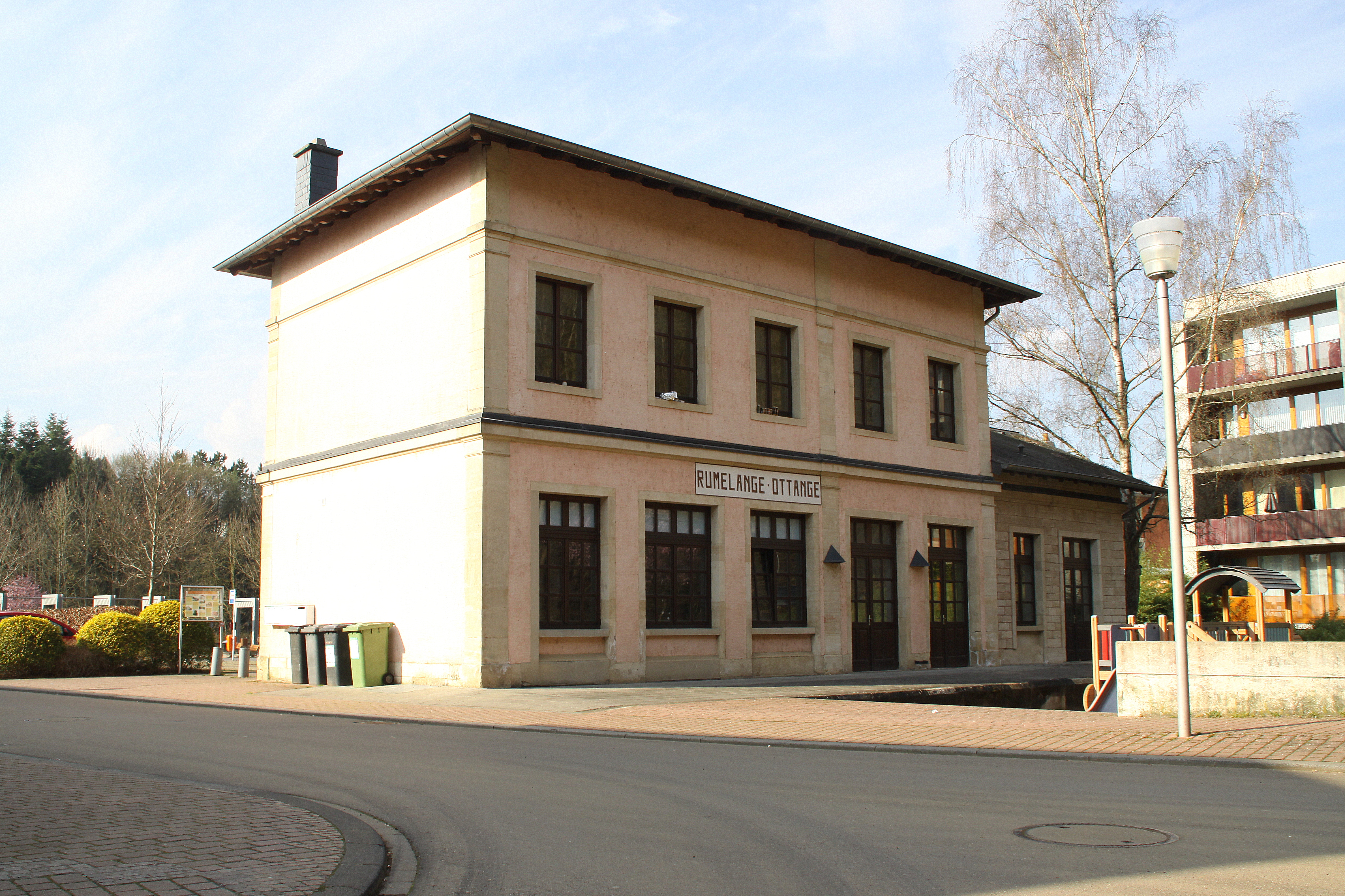 Déi fréier Gare Rëmeleng-Ëtteng